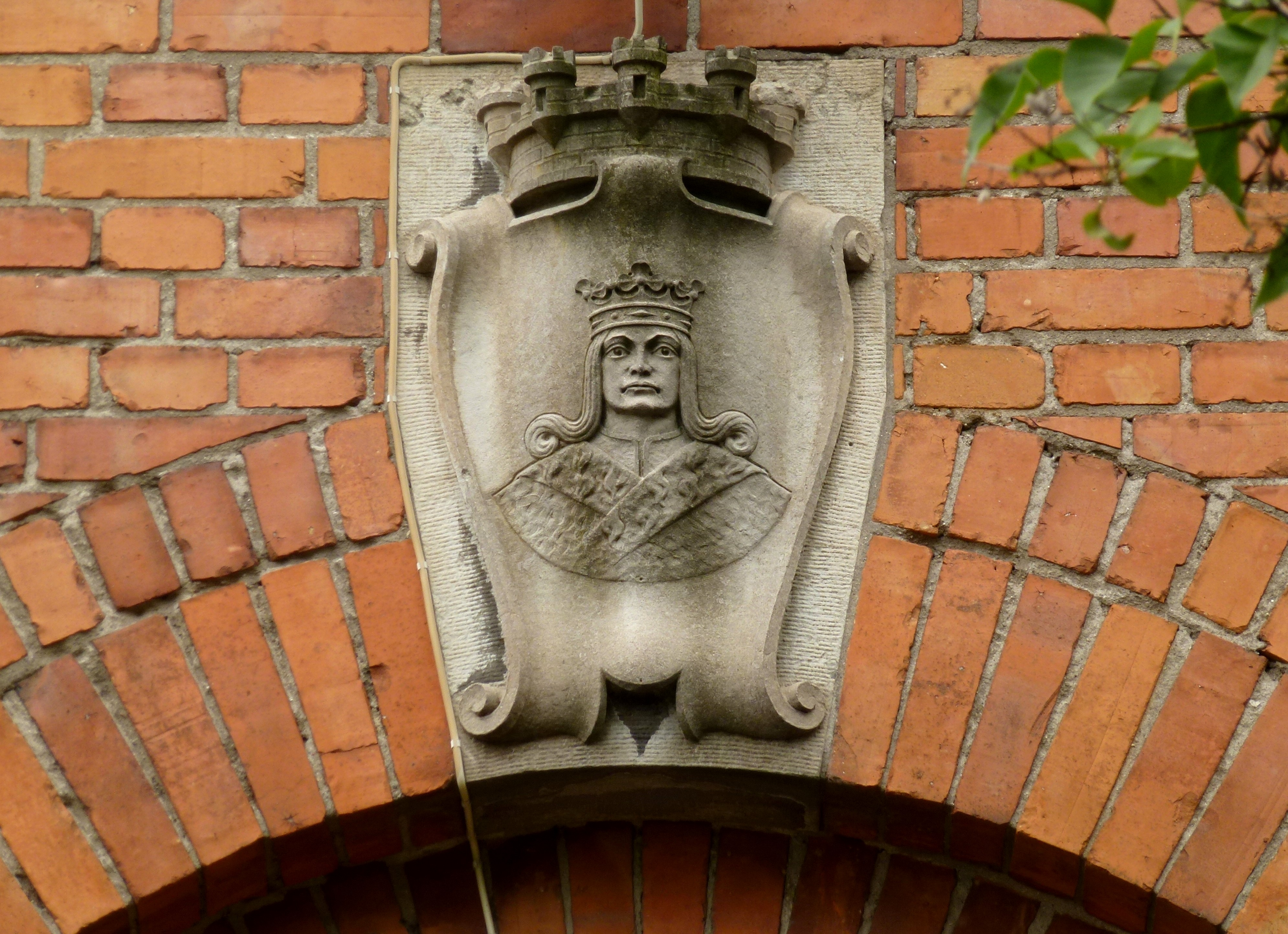 Nybohovsstationen i Liljeholmen stod klar 1914 (detalj med S:t Erik över dörren)